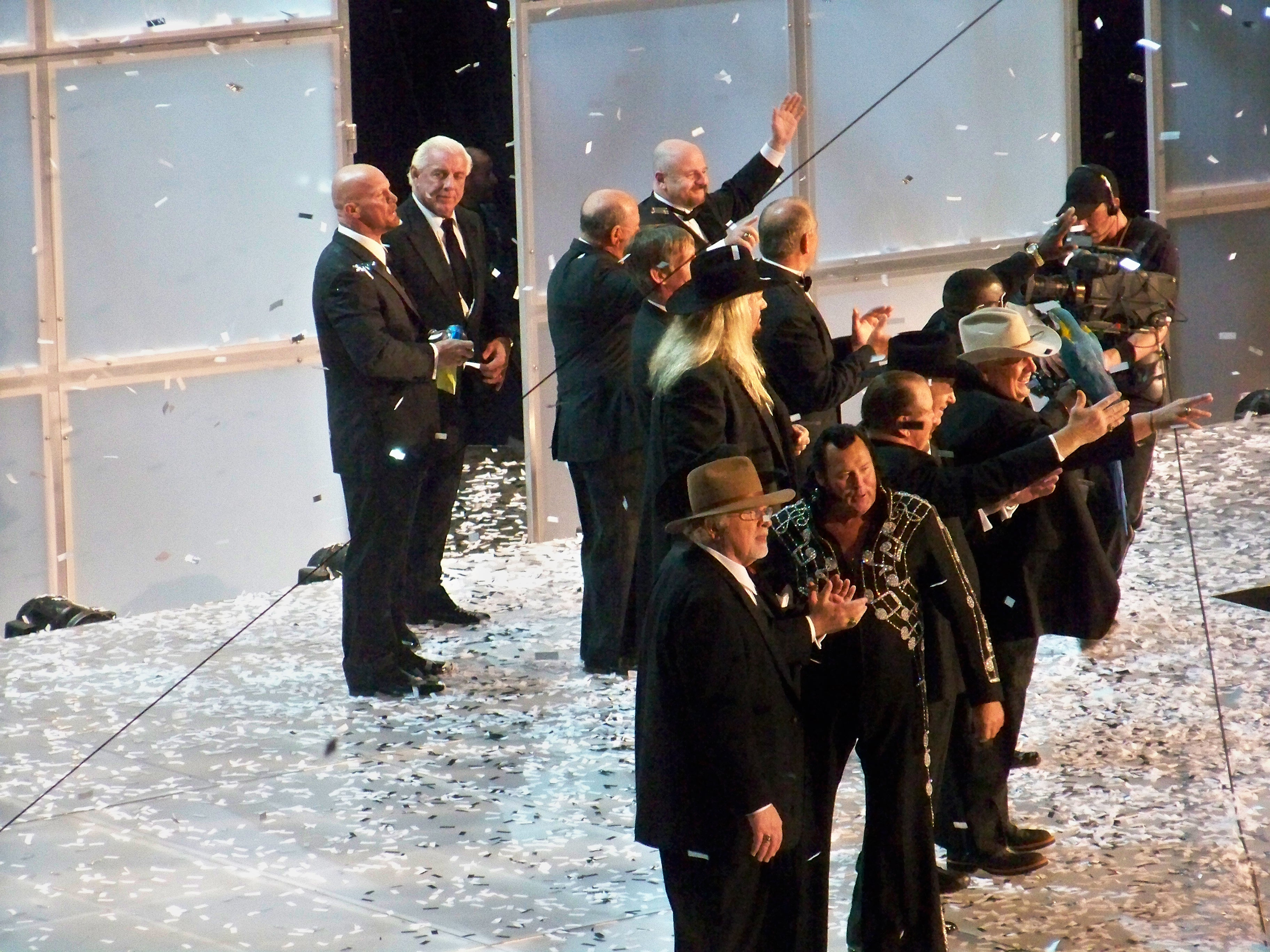 Toute la classe de 2009 à la fin